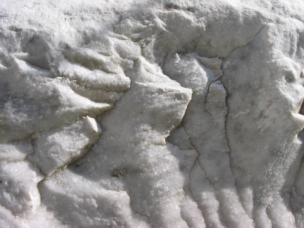 marble, detail